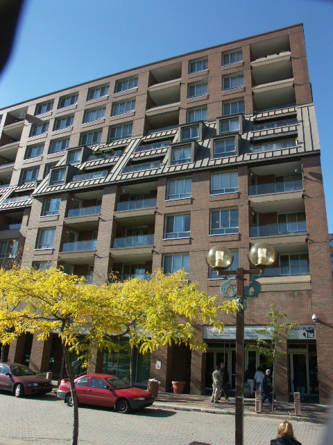 Les habitations du centre-ville, the residential section of Complexe Guy-Favreau, in Montreal. View from de La Gauchetière Street. Photo by: User:Gene.arboit